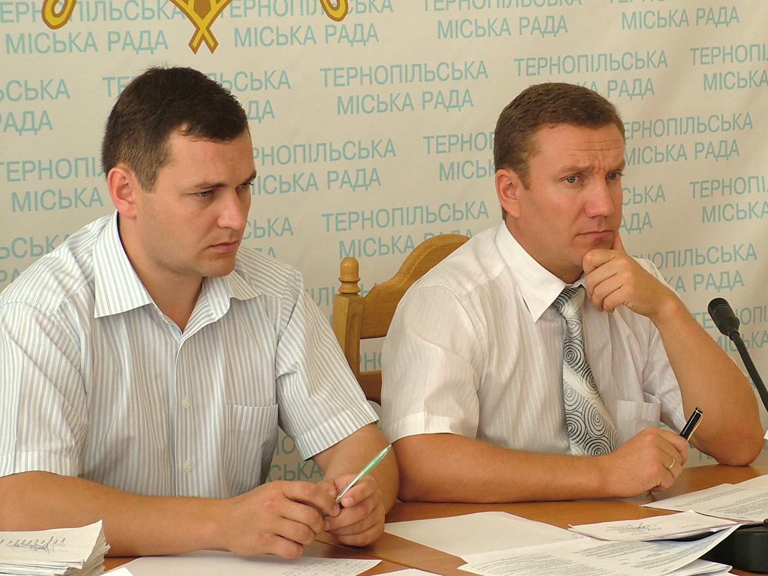 Тарас Білан і міський голова Тернополя Роман Йосипович Заставний на сесії Тернопільської міської ради (2008 рік).